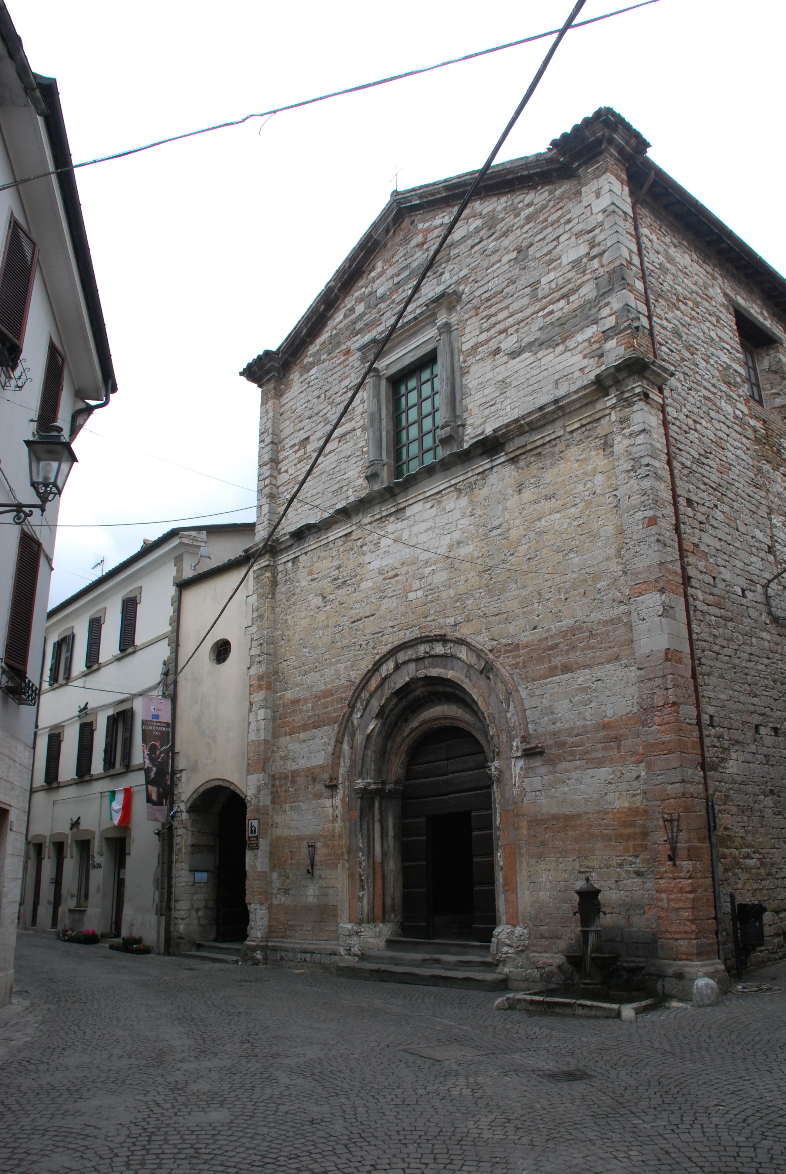 Nella cittadina di Cantiano, marchigiana ma appartenente alla diocesi umbra di Gubbio, si tiene l'edizione 2011 del Congresso generale di Europassion, l'associazione che riunisce quasi 90 sacre rappresentazioni pasquali allestite nei paesi di tutta Europa (30 aprile 2011, foto pressnews.it)